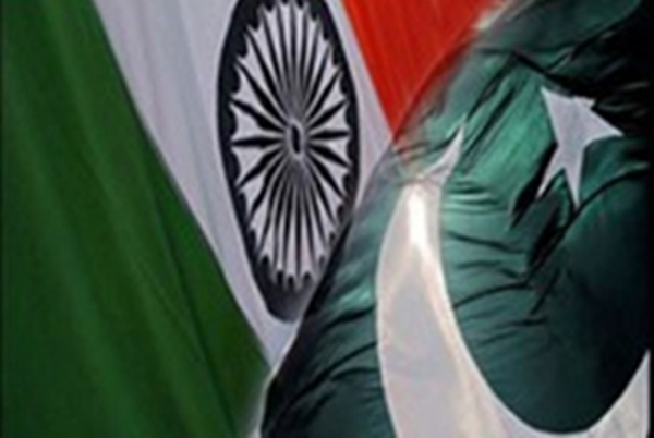 Indisch-Pakistanische Friedenskonferenz 2010